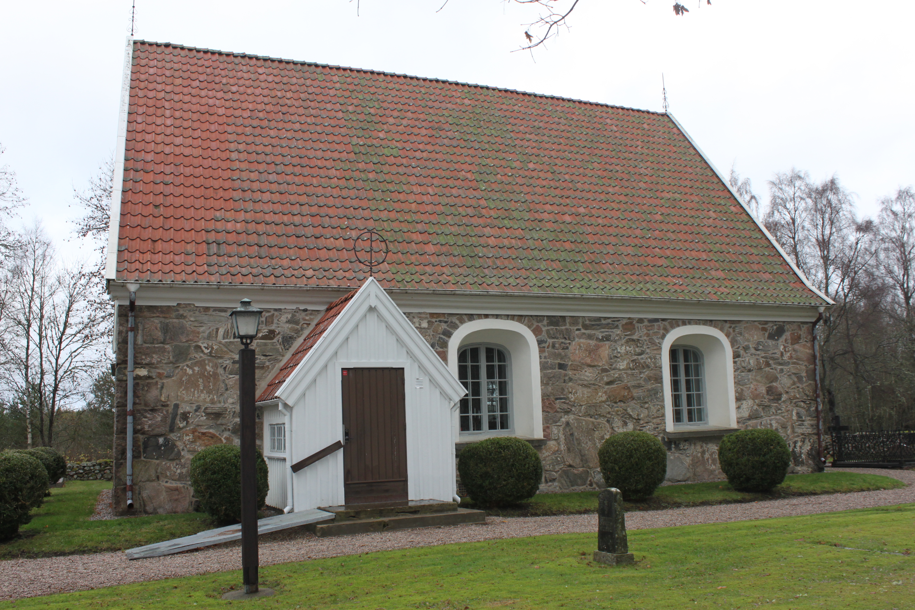 Fullestads kyrka. 2 november 2013.